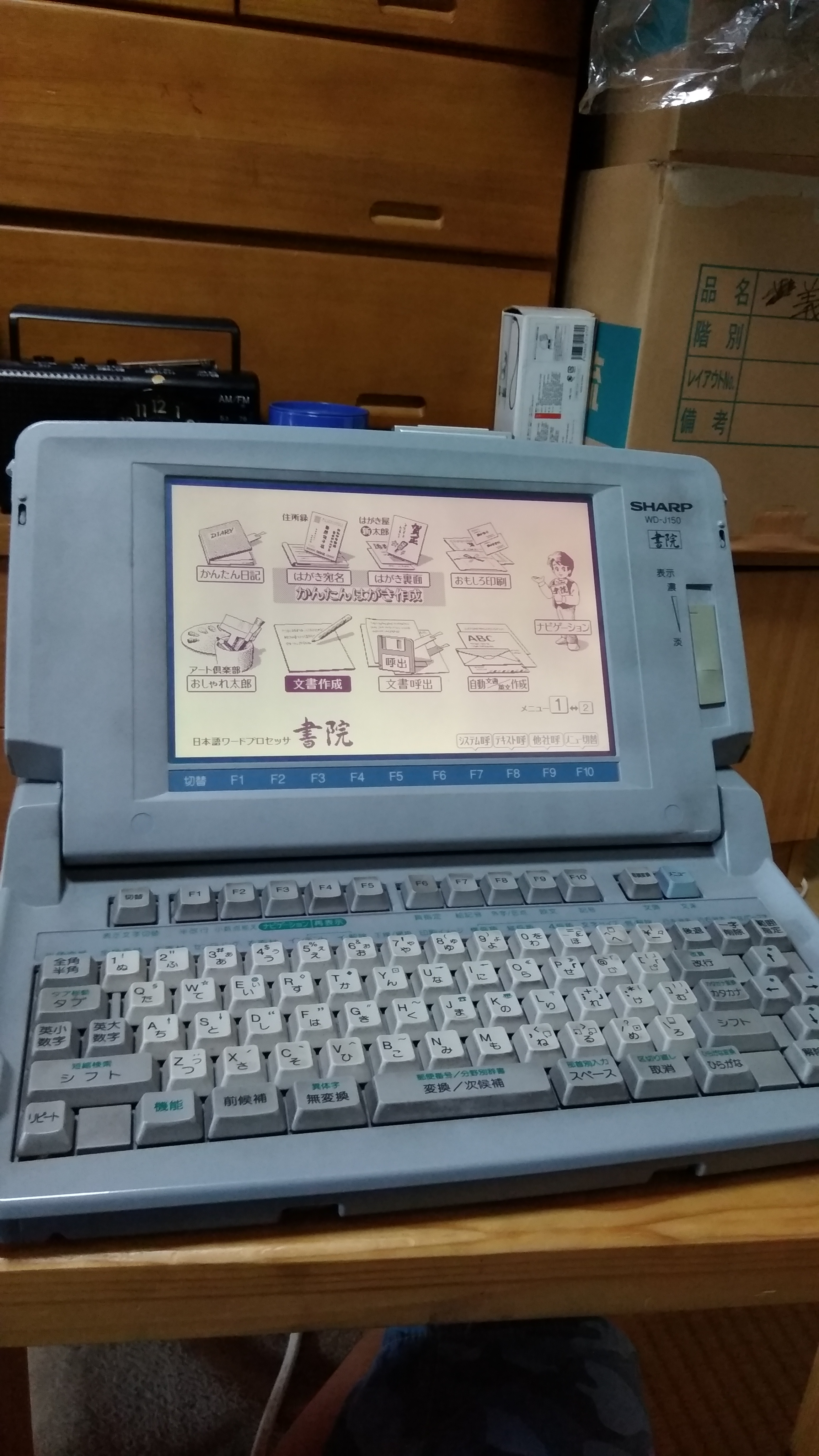 シャープの書院 WD-J150です。これは、1997年に発売されました。本体が汚いですが、現役です!